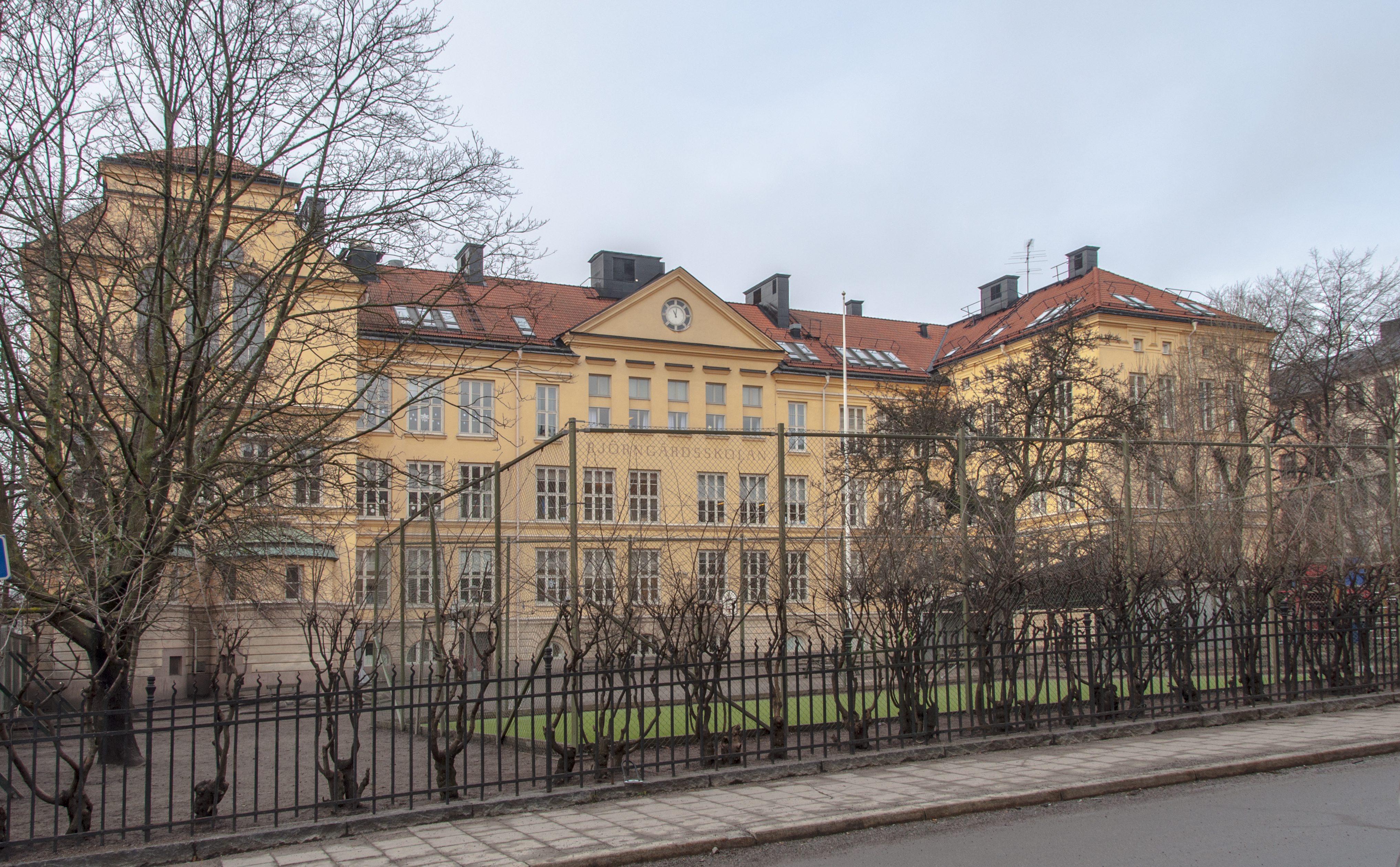 Björngårdsskolan, från Björngårdsgatan. Ursprungligen Folkskolelärarinneseminarium. Nybyggnadsår 1905 - 1908, Byggnadsstyrelsen (Byggherre), Gustaf E. Petterson (1855-1933) (Arkitekt)